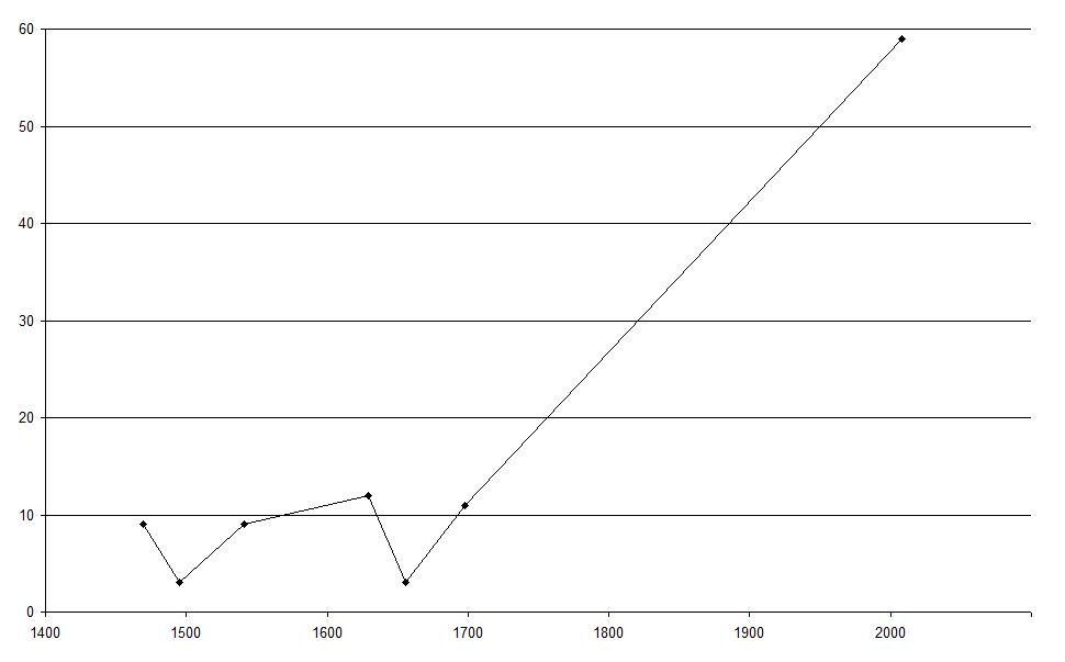 Evolution du nombre de foyers à Assenois, commune de Vaux-su-Sûre (Belgique).